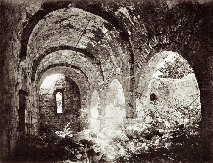 ოპიზა - 1888, სატრაპეზო, პავლინოვის ფოტო